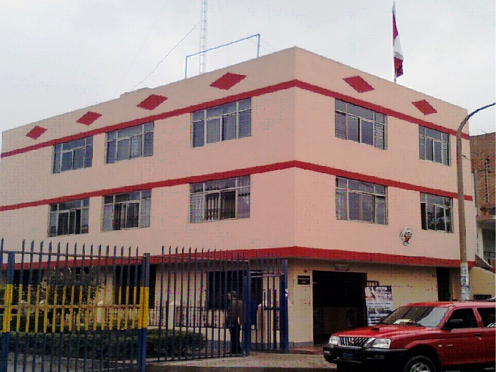 juzgado canta